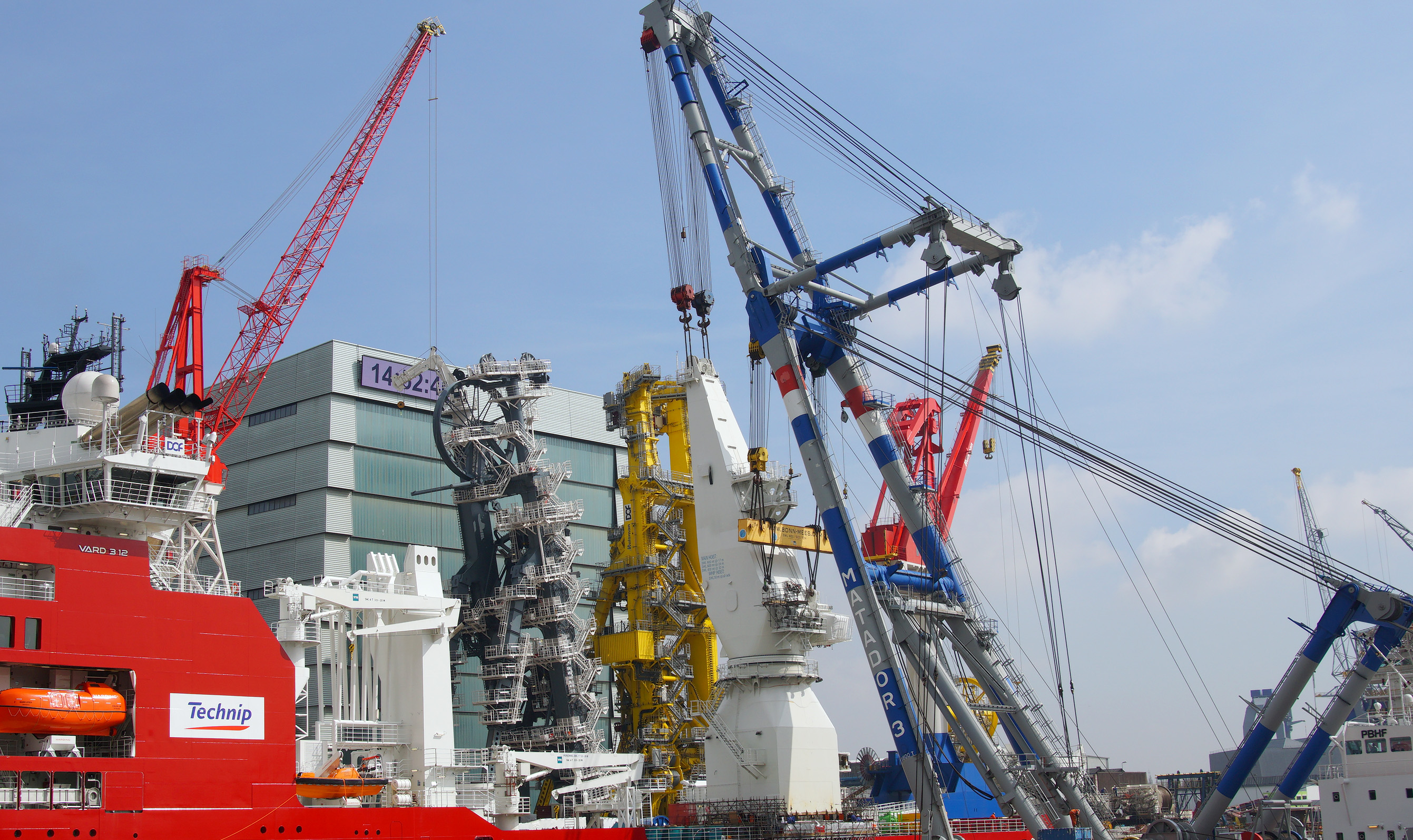 Huisman Wiltonhaven Schiedam 8-4-2015